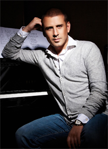 Музыкальный продюсер Лопатин